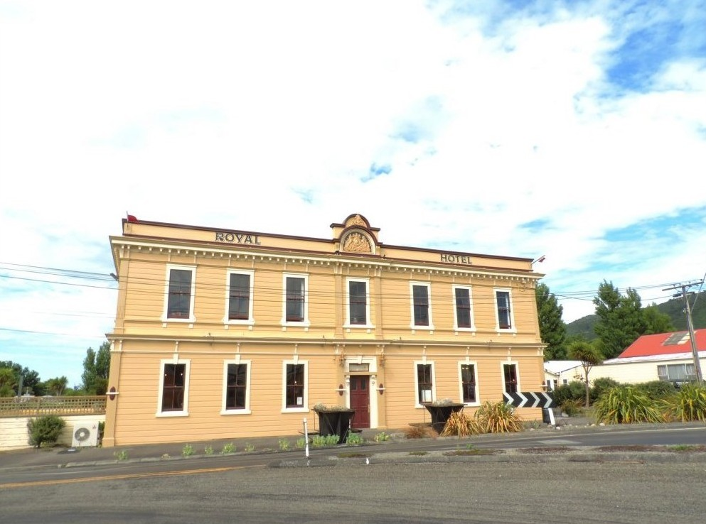 En route, la jolie petite ville de Featherston.